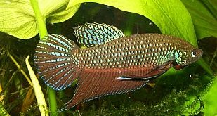 Betta smaragdina male